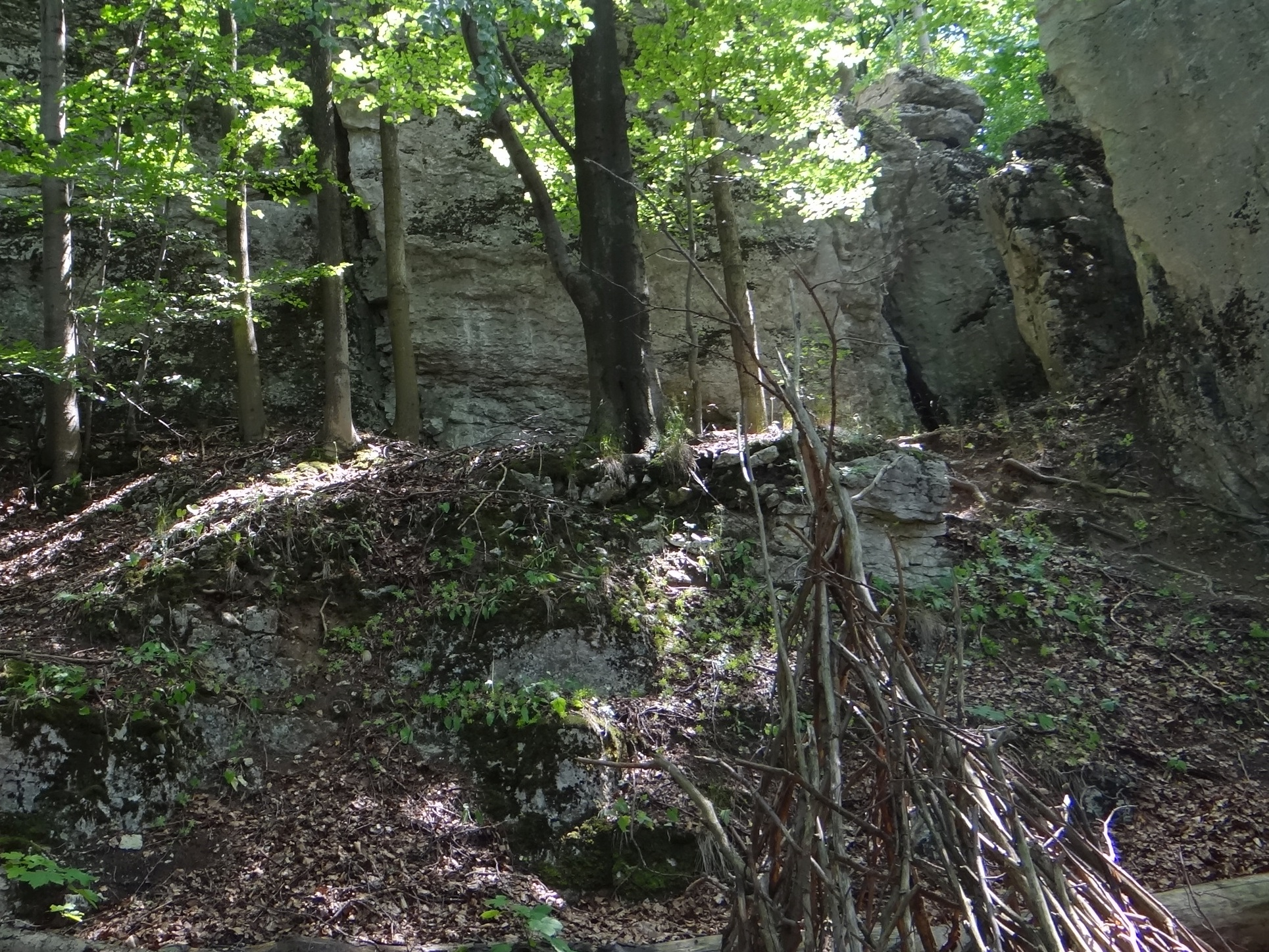 Skały nad Koplnią z otworem Jaskini Jaroszowskiej